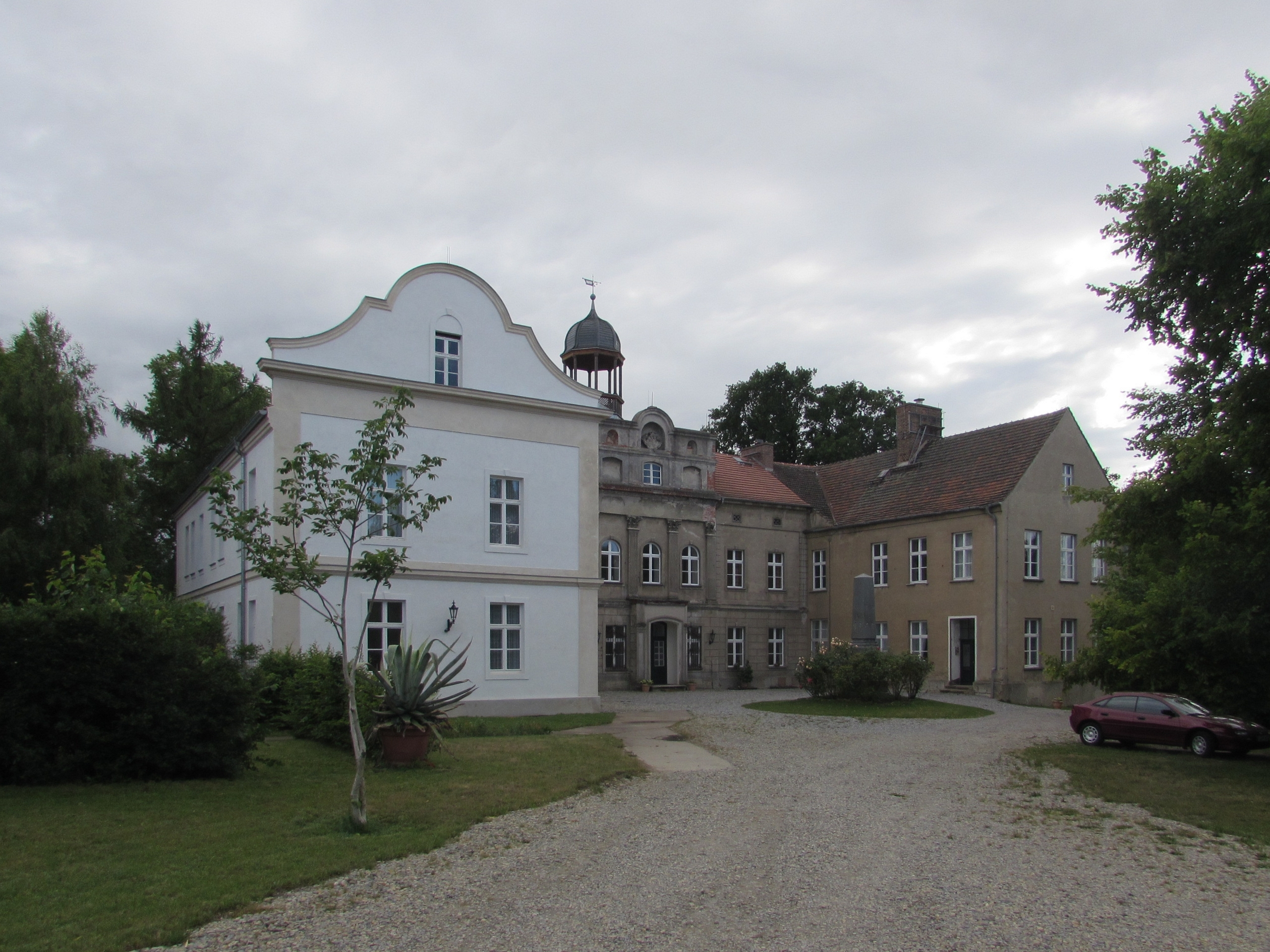 gutshaus karow, jerichower land, nordseite